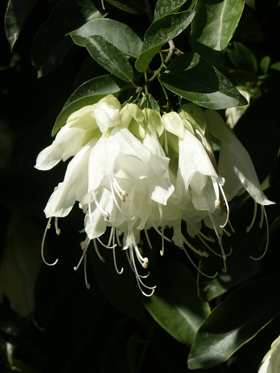 Oxera pulchella, Fairchild Tropical Botanic Garden, Miami, FL, USA